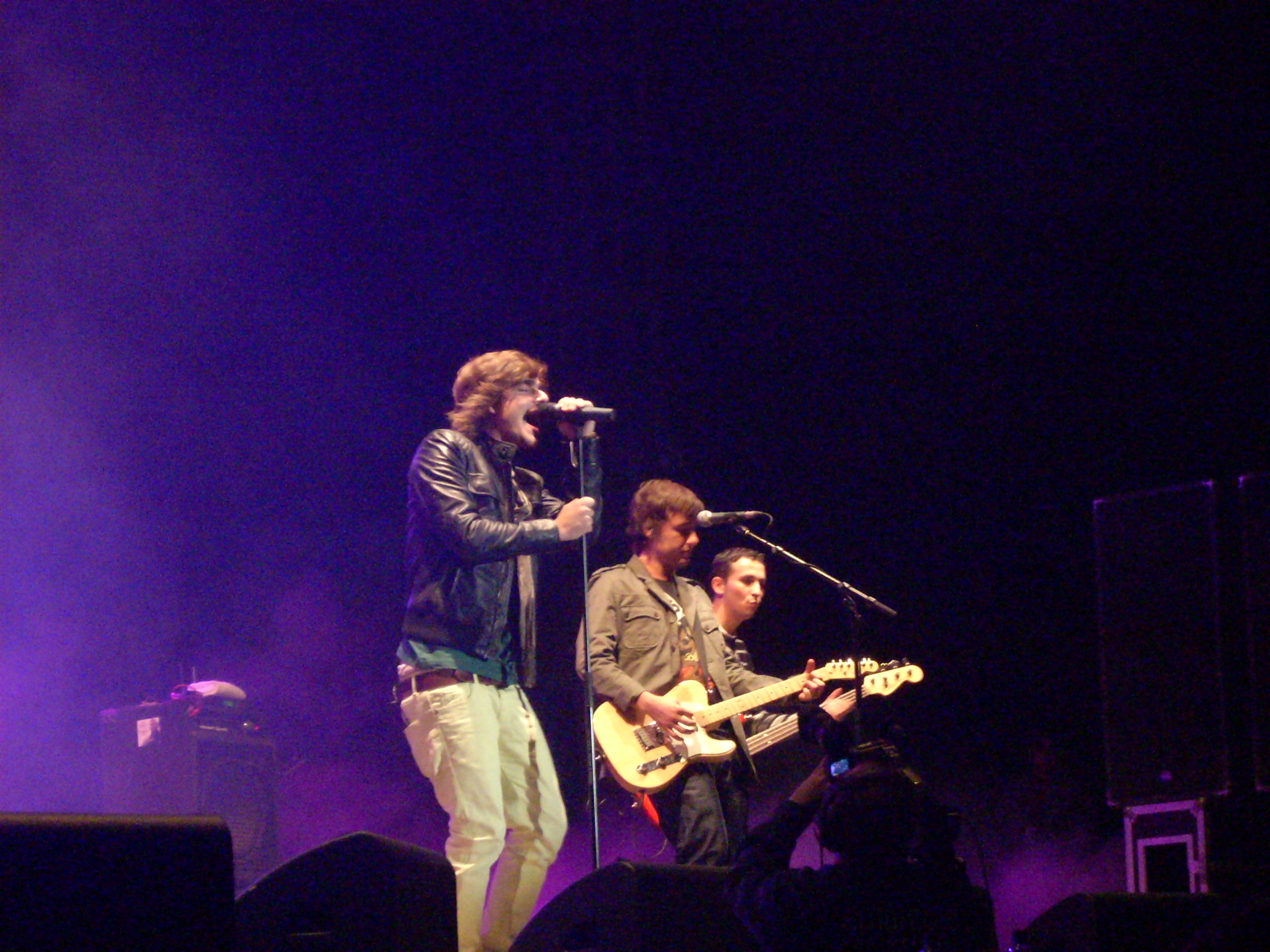 Melocos en directo (Zaragoza)